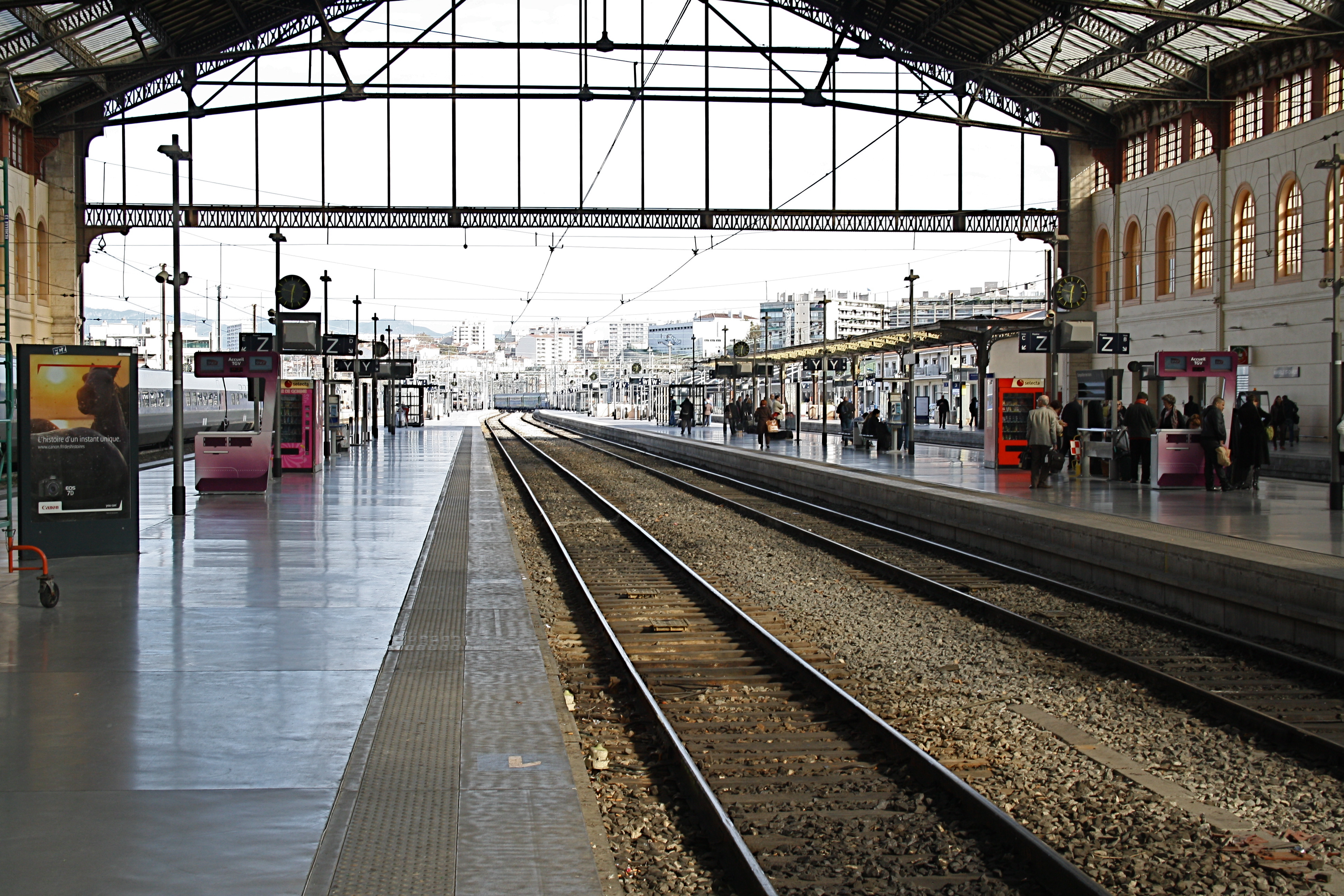 Bahnhofshalle Marseille-Saint-Charles.